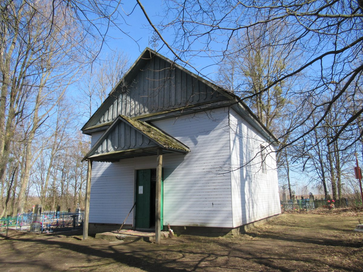 Нагорнае. Спаса-Праабражэнская царква